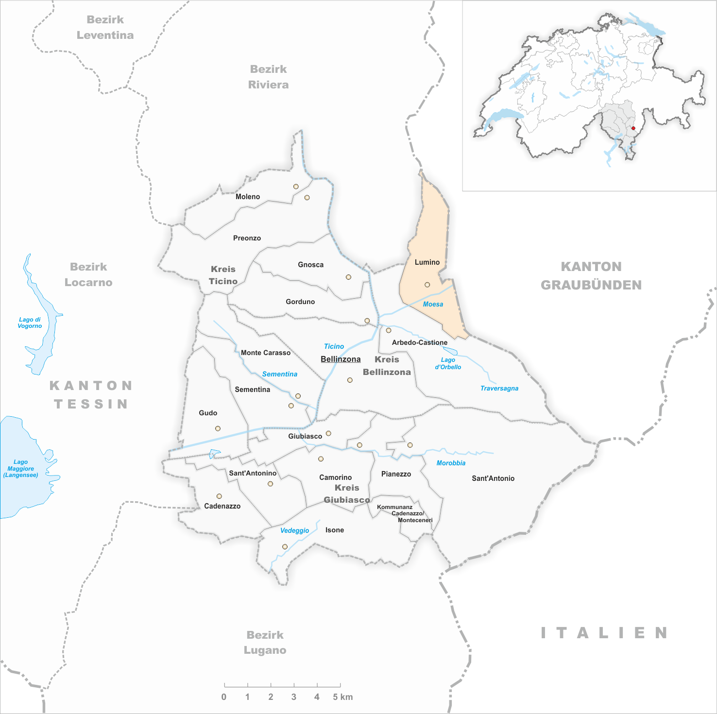 Municipality Lumino